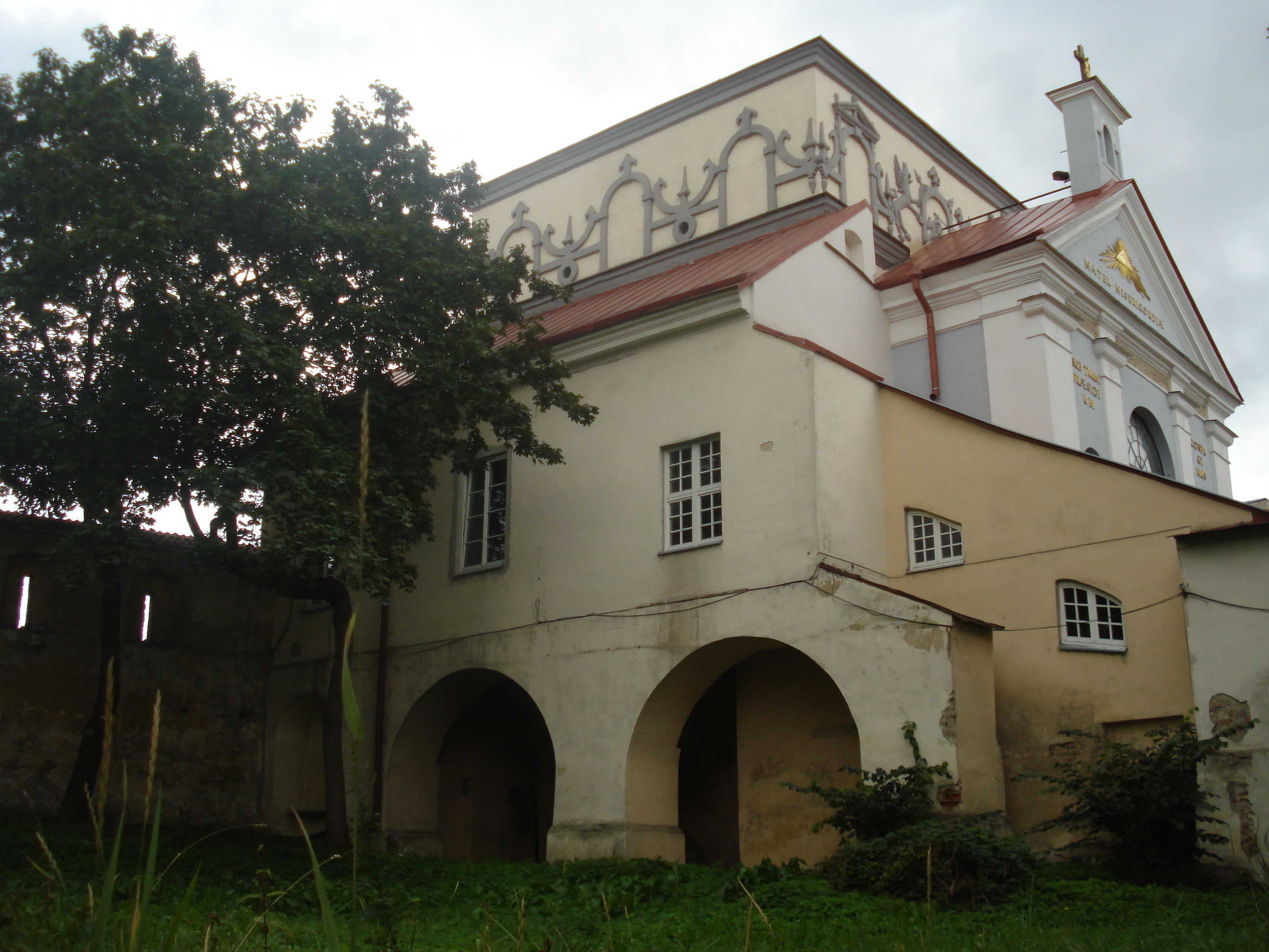 Ostra brama from left side